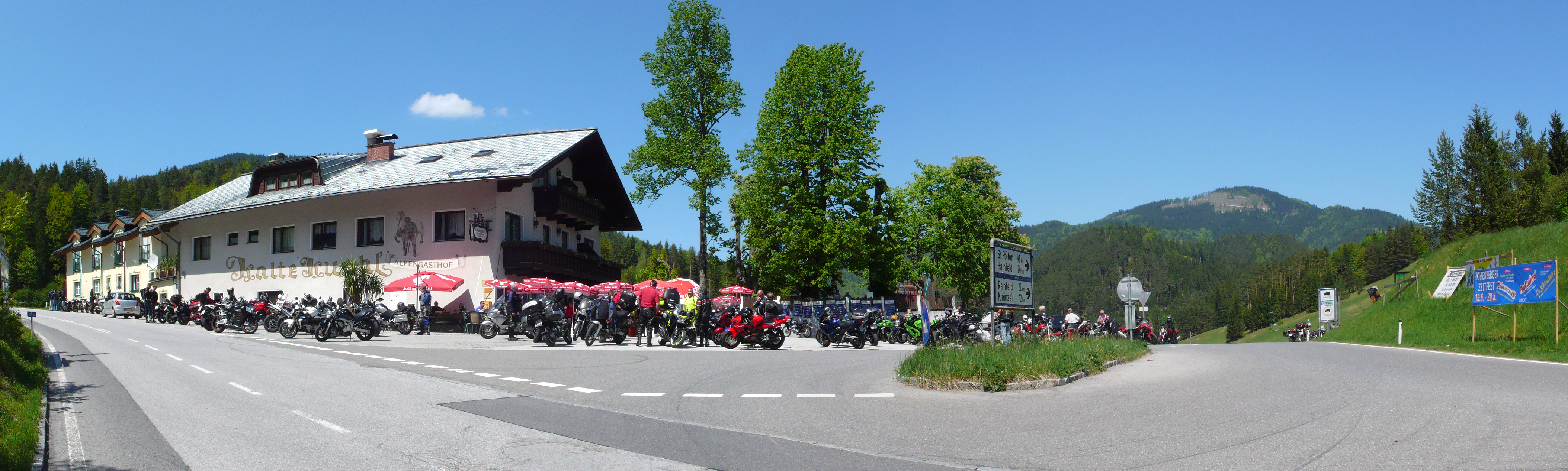 Alpengasthof Kalte Kuchl auf der gleichnamigen Passhöhe in den Gutensteiner Alpen in Niederösterreich; links die Straße zum Ochsattel, rechts die Straße nach Hainfeld.